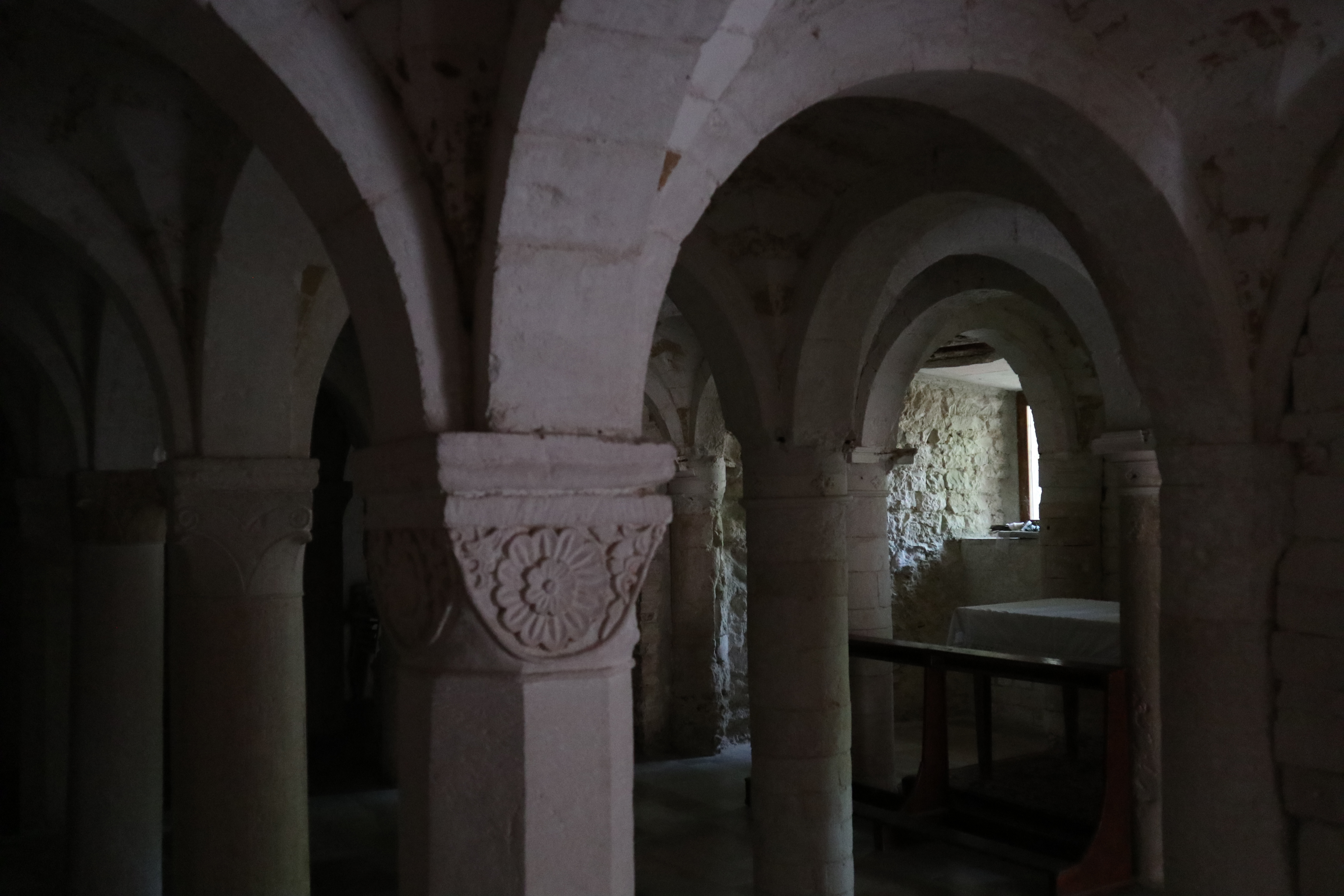 Cripta